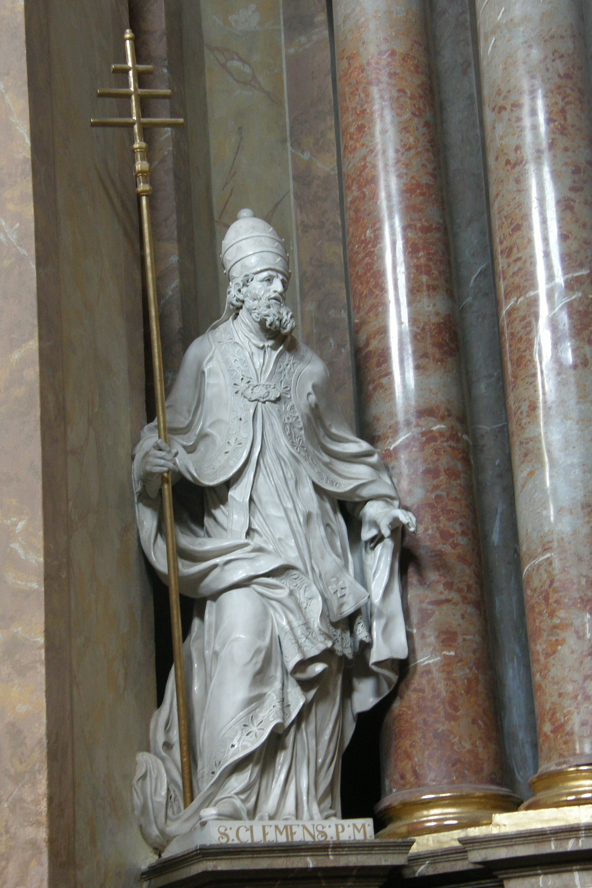 klášter paulánů (Vranov), Vranov 6